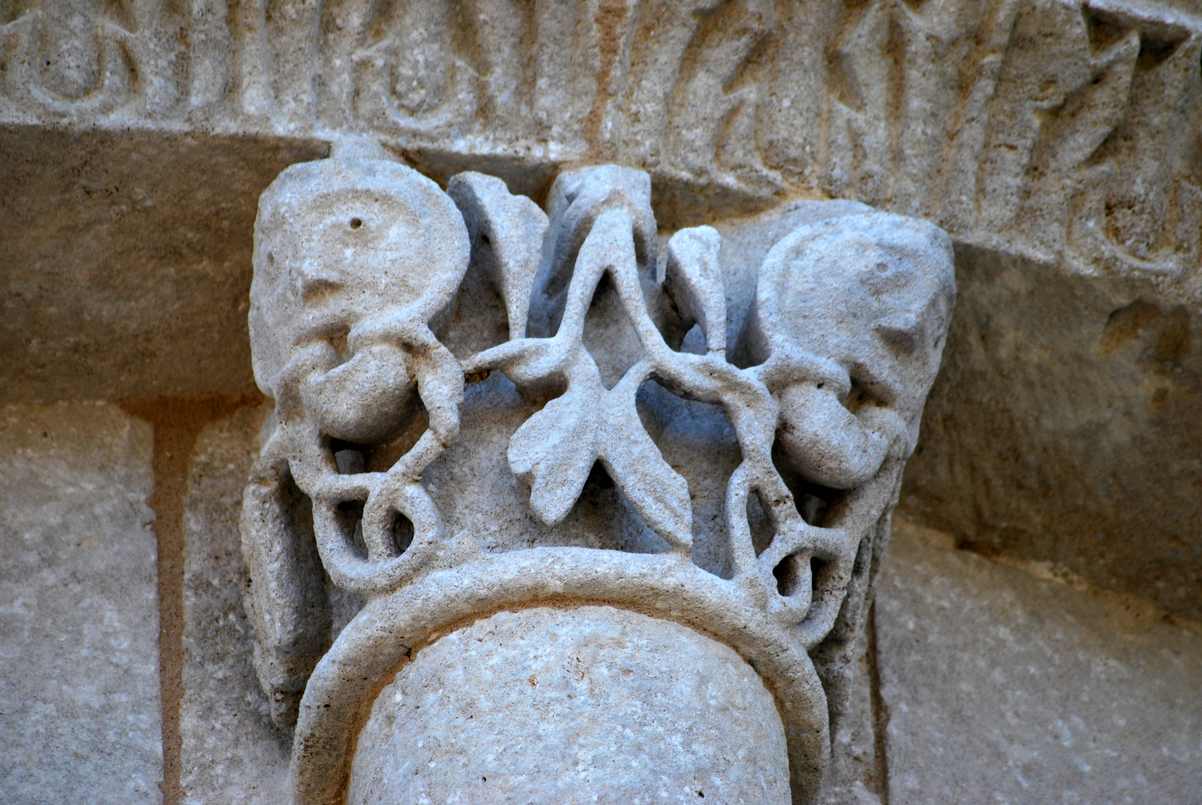 Église Saint-Quentin de Baron, Gironde